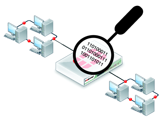 Монгол: Packet sniffer